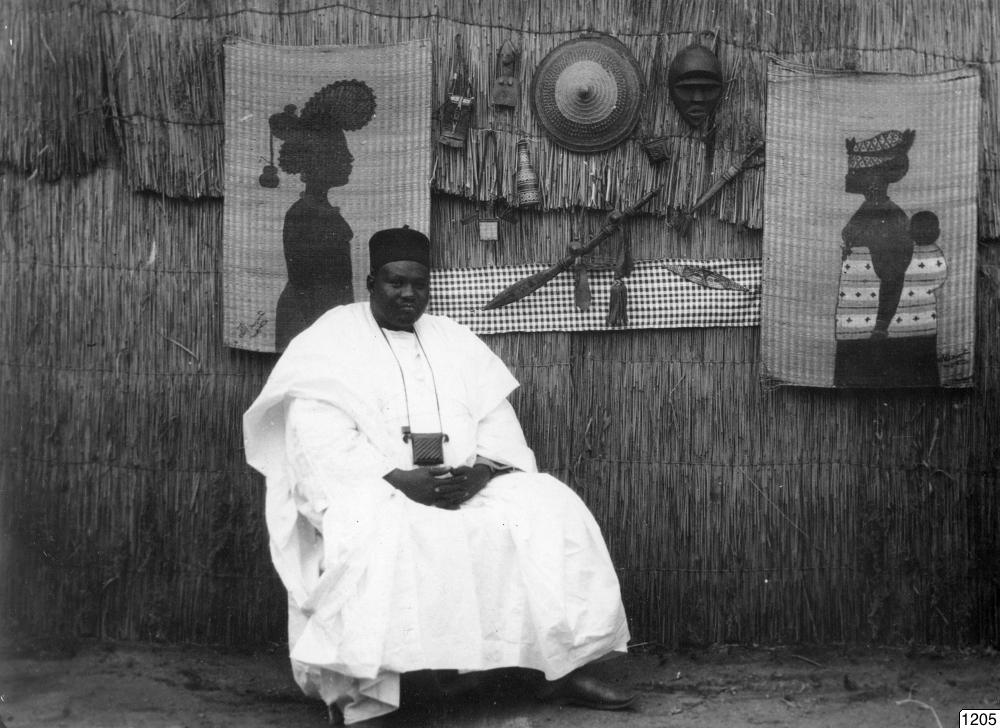 Svart-vitt foto av en svart man i vit klädnad. Han sitter framför en vägg där afrikanska föremål och textil-applikationer (?) är fästade.